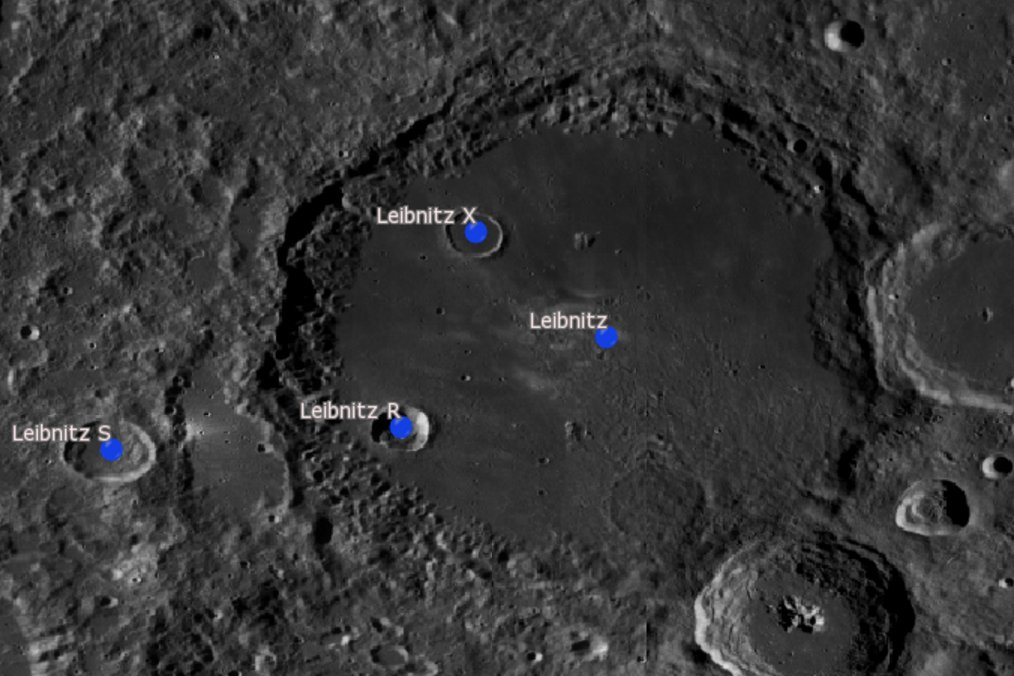 Cráter lunar Leibnitz. Cráteres satélite. (Imagen LRO)